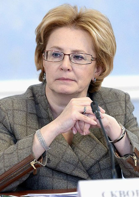 Министр здравоохранения Вероника Скворцова на заседании президиума Государственного совета «О государственной политике в сфере семьи, материнства и детства»